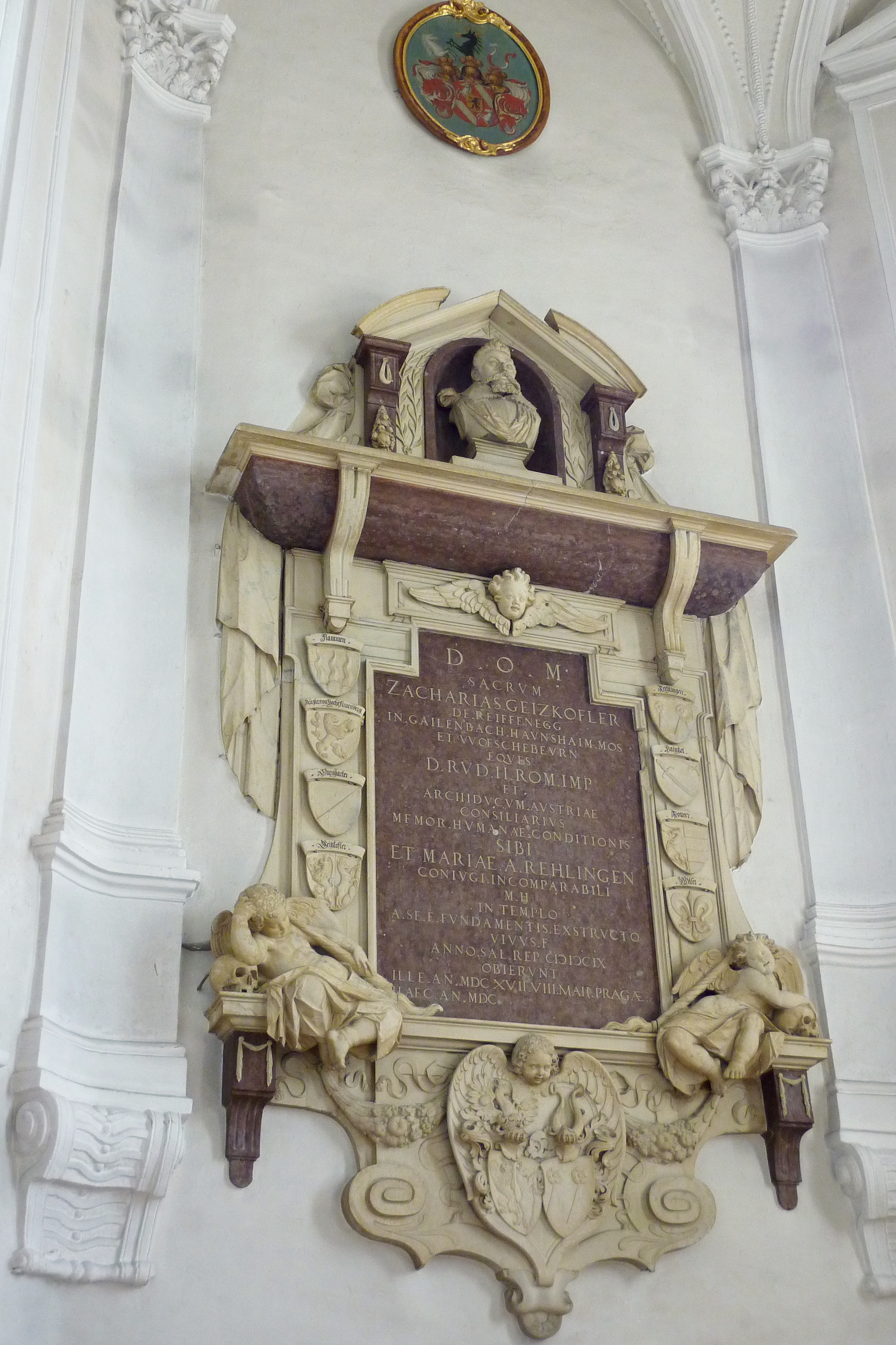 Evangelisch-lutherische Dreifaltigkeitskirche in Haunsheim, einer Gemeinde im Landkreis Dillingen an der Donau (Bayern), Epitaph für Zacharias Geizkofler (gest. 1617) und seine Ehefrau Maria A. Rehlingen (gest. 1616), 1617 von Christoph Murmann geschaffen